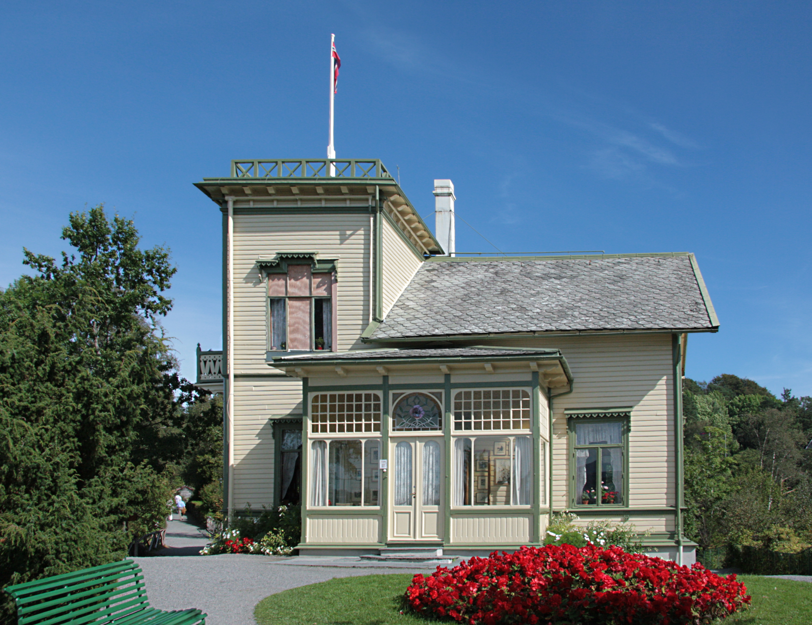 Дом-музей Эдварда Грига под Бергеном, Норвегия